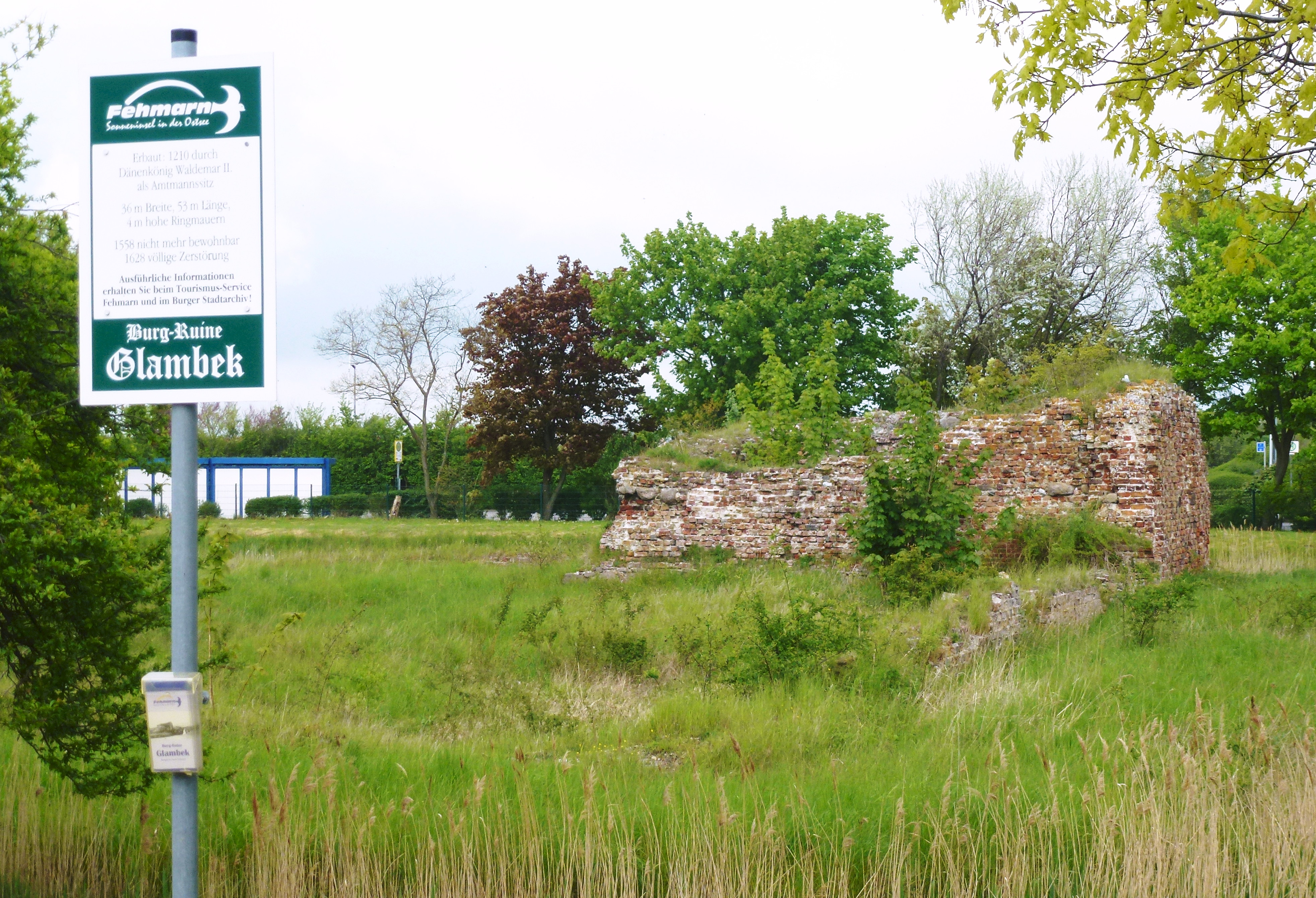 Burgruine Glambeck